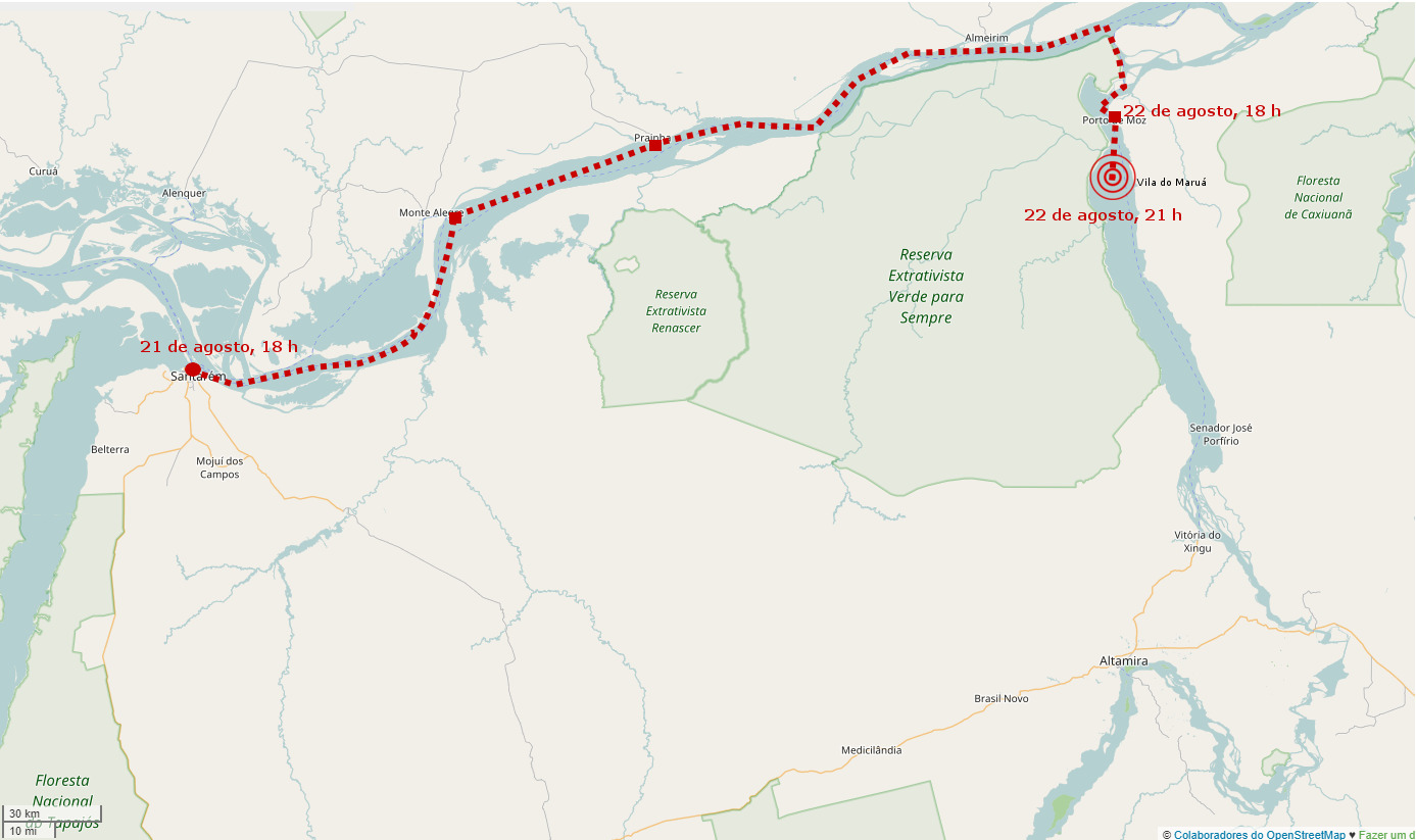 Mapa da rota e naufrágio do Comandante Ribeiro